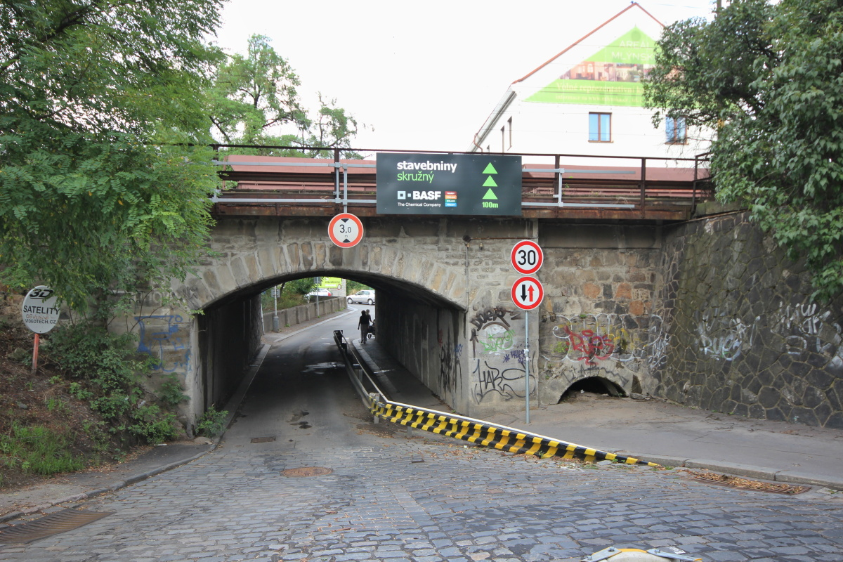 Negrelliho viadukt, Praha 6 - Bubeneč